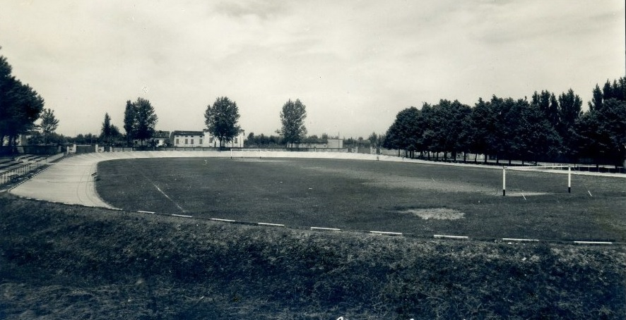 Cavezzo - Campo sportivo comunale